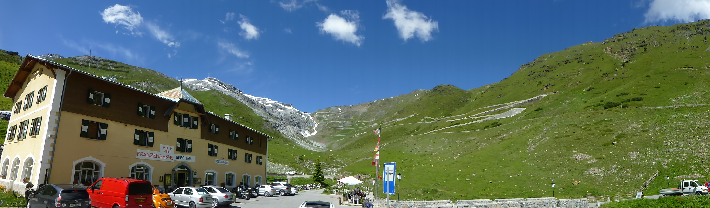 Stelvio-hágó: panorámakép a keleti oldalon (Trafoi-völgy)